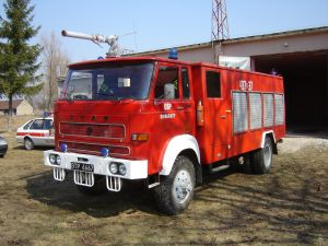 OSP w Domuratach